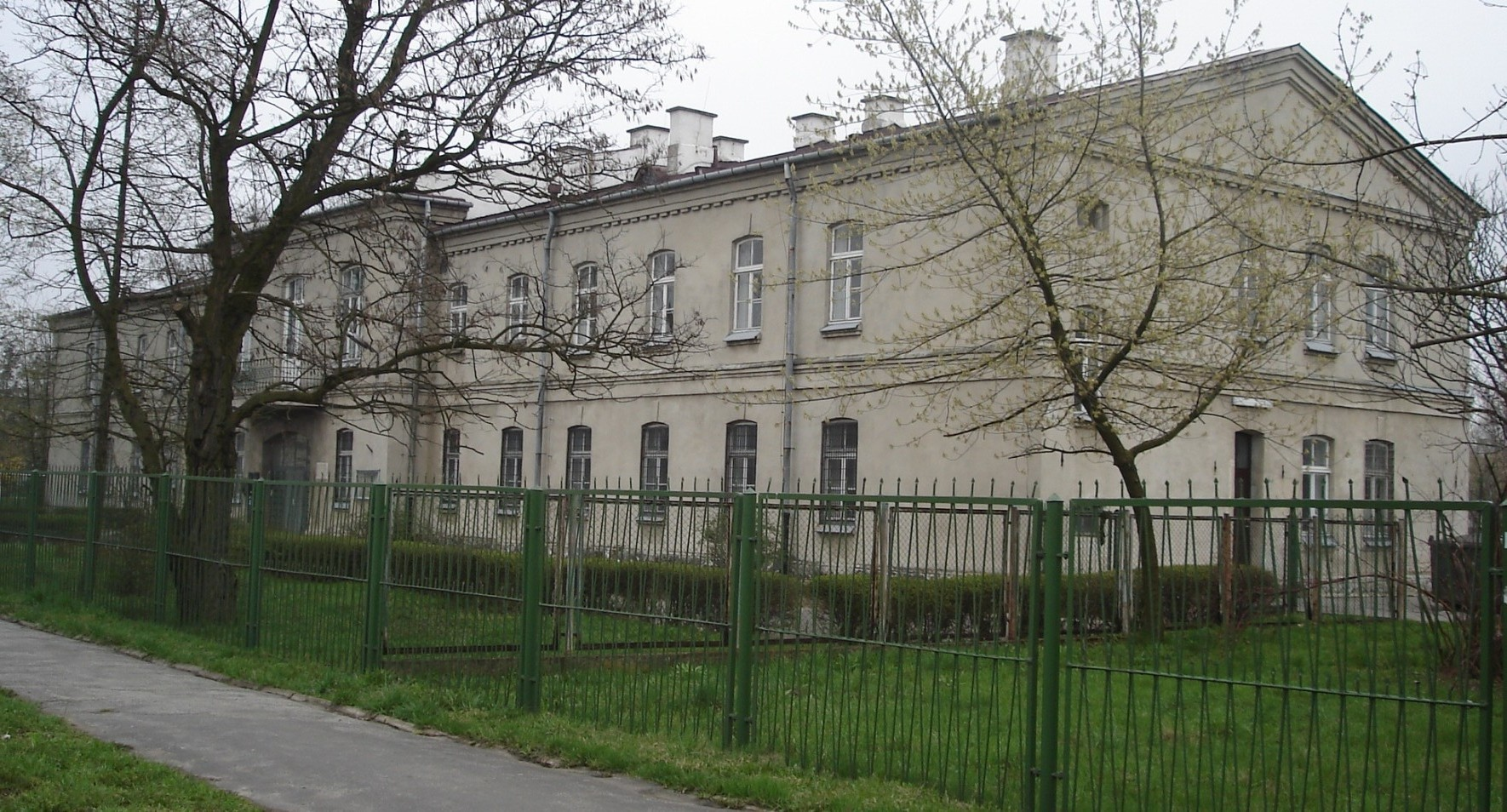 Były GKO, Garnizon Przasnysz